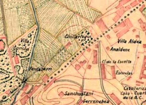 Txillardegi etxea ("Chillardegui") Donostiako Antigua auzokoplano batean (1900).